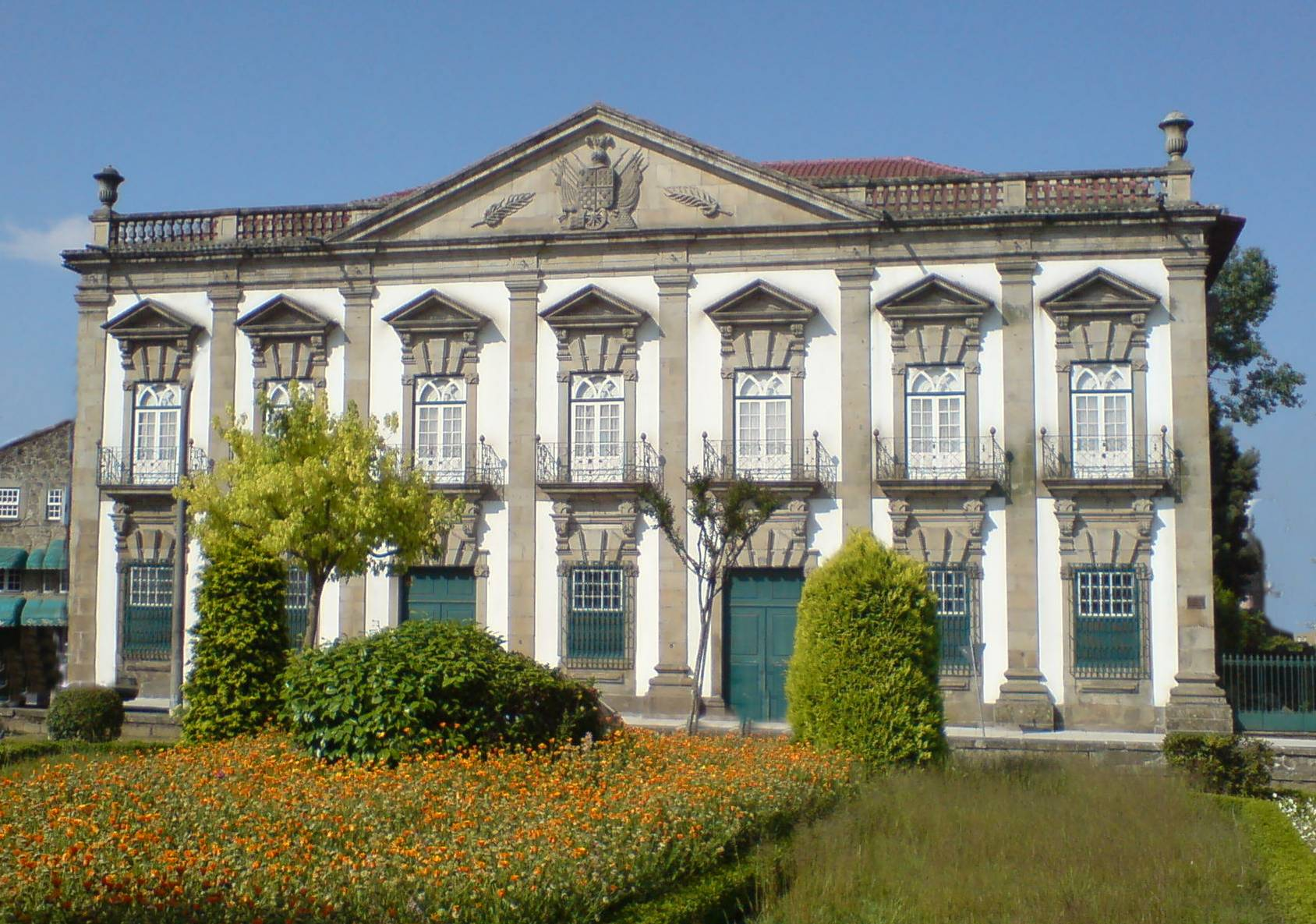 House Cunha Reis in Braga Portugal